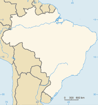 Brazil map blanked